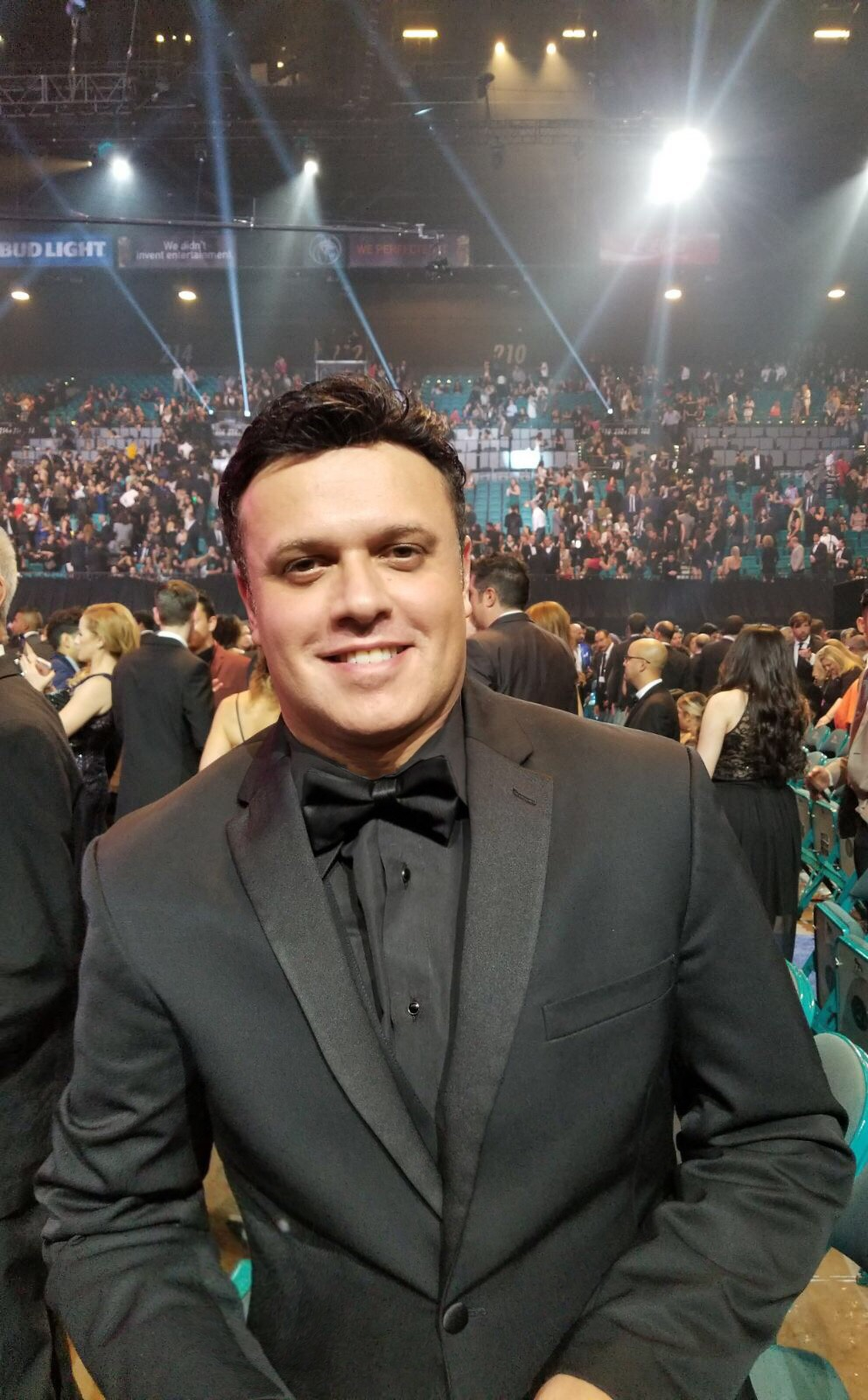 Hildemaro Álvarez durante actividades preliminares desarrolladas en el marco de la entrega de los premios Latin Grammy 2017